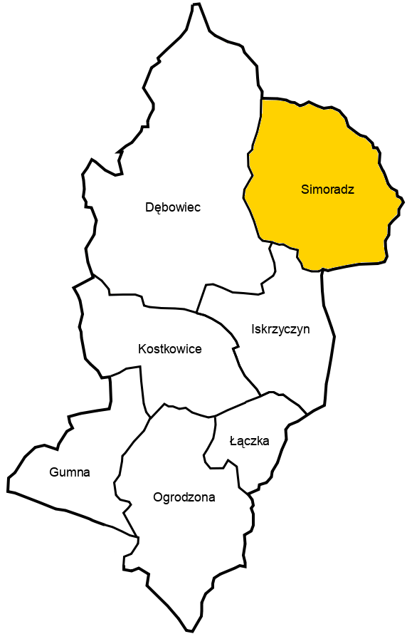 Sołectwo Simoradz na mapie gminy